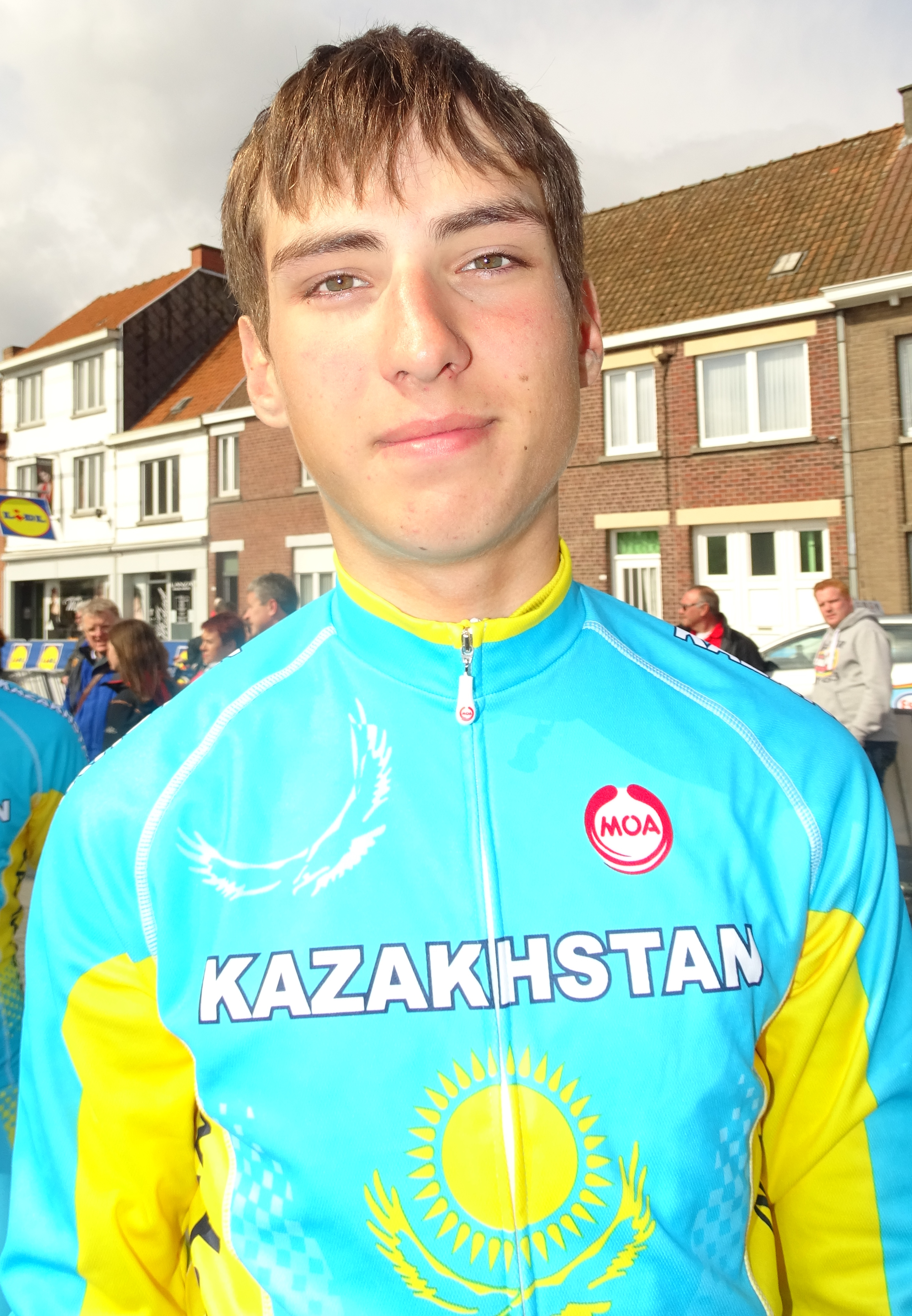 Reportage réalisé le samedi 11 avril à l'occasion du départ et de l'arrivée du Tour des Flandres espoirs 2015 à Audenarde, Belgique.